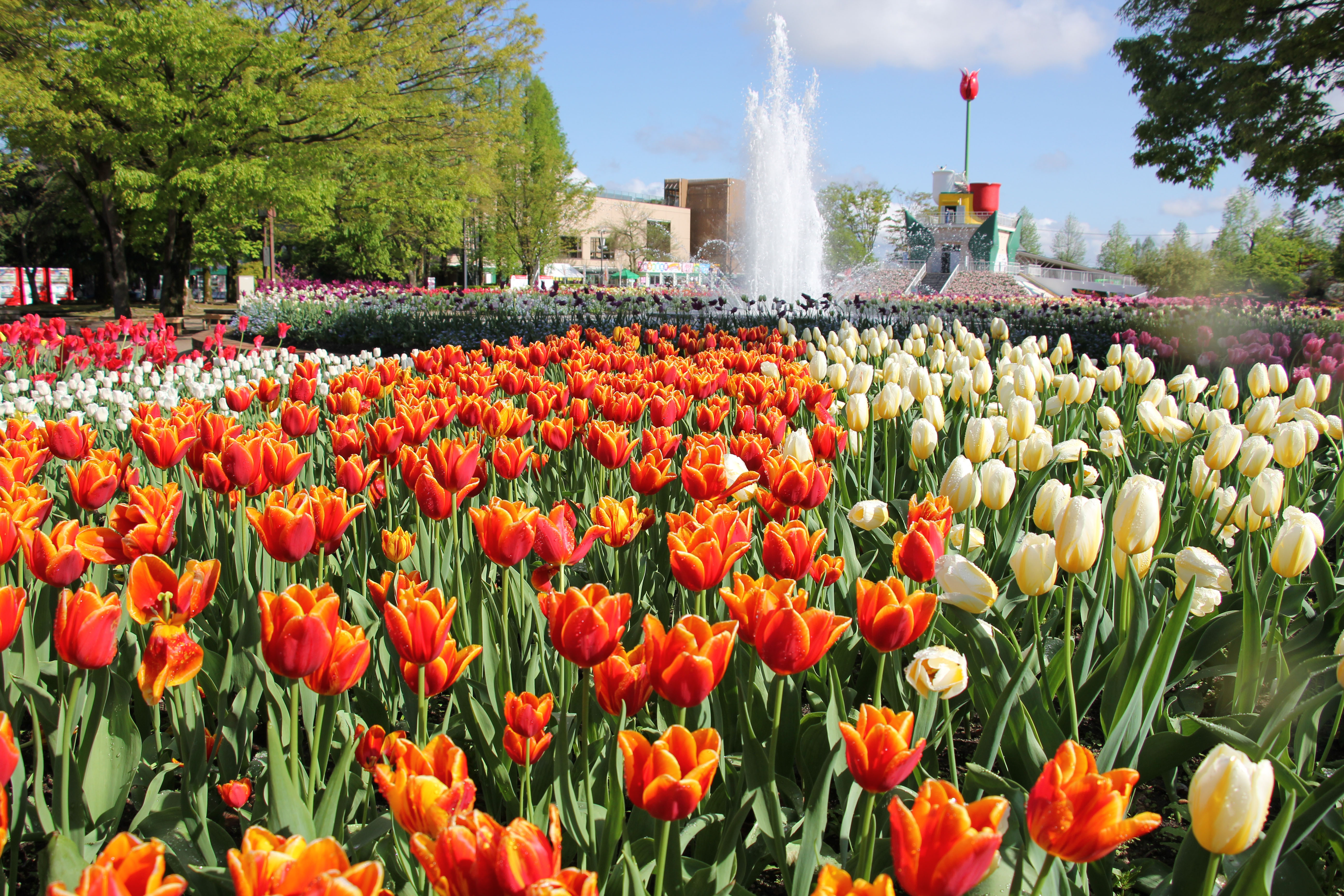 2018となみチューリップフェア